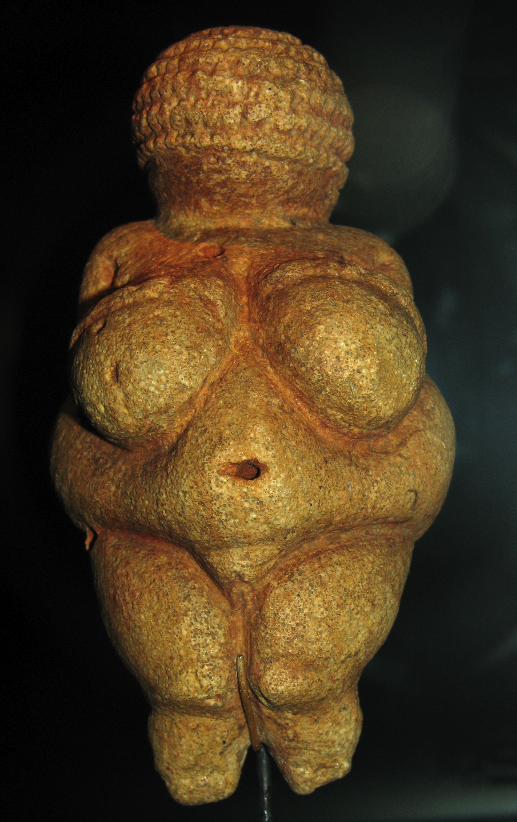 Die Venus von Willendorf, weitere Fotos und Informationen unter